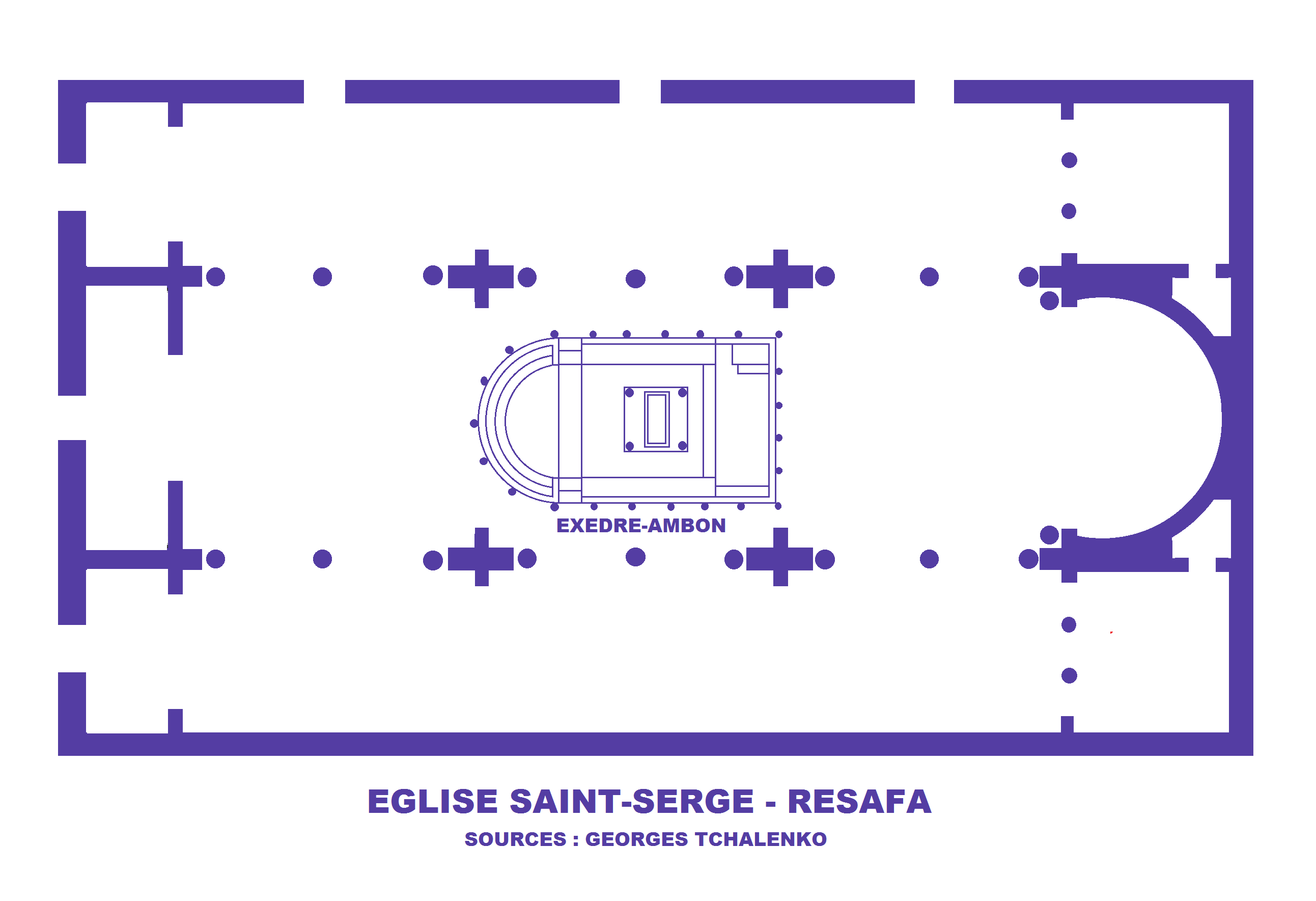 Resafa, église Saint-Serge, Plan